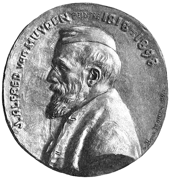 Jacques Alfred van Muyden (1818–1898) Maler. Medaille, gestaltet 1900 von seinem Sohn Henry Muyden